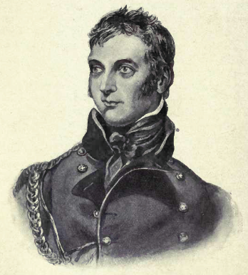 Portrait de Sir George Murray